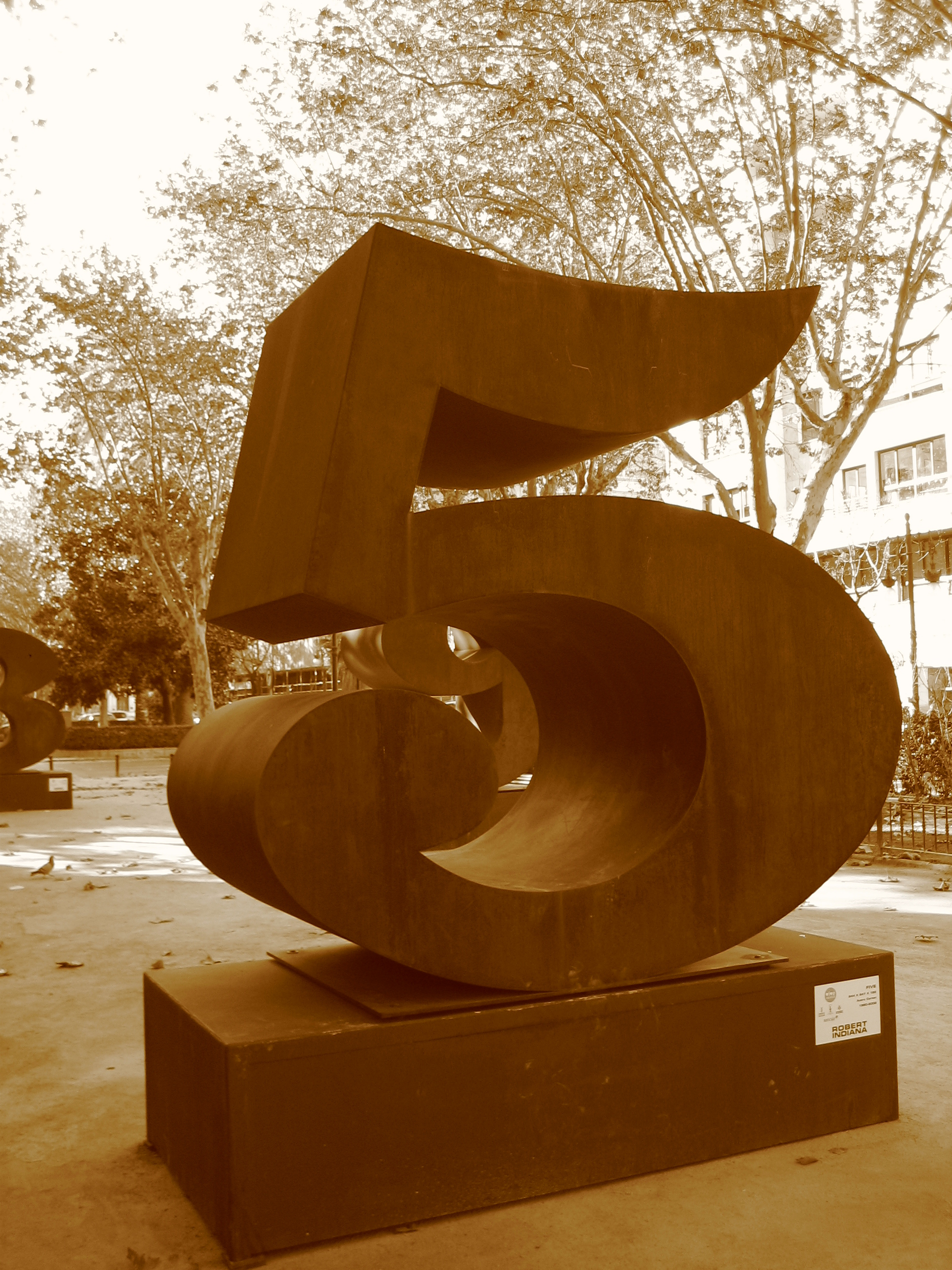 Robert Indiana. "Por amor al arte". Valencia, 8 enero 2007 - 25 febrero 2007.